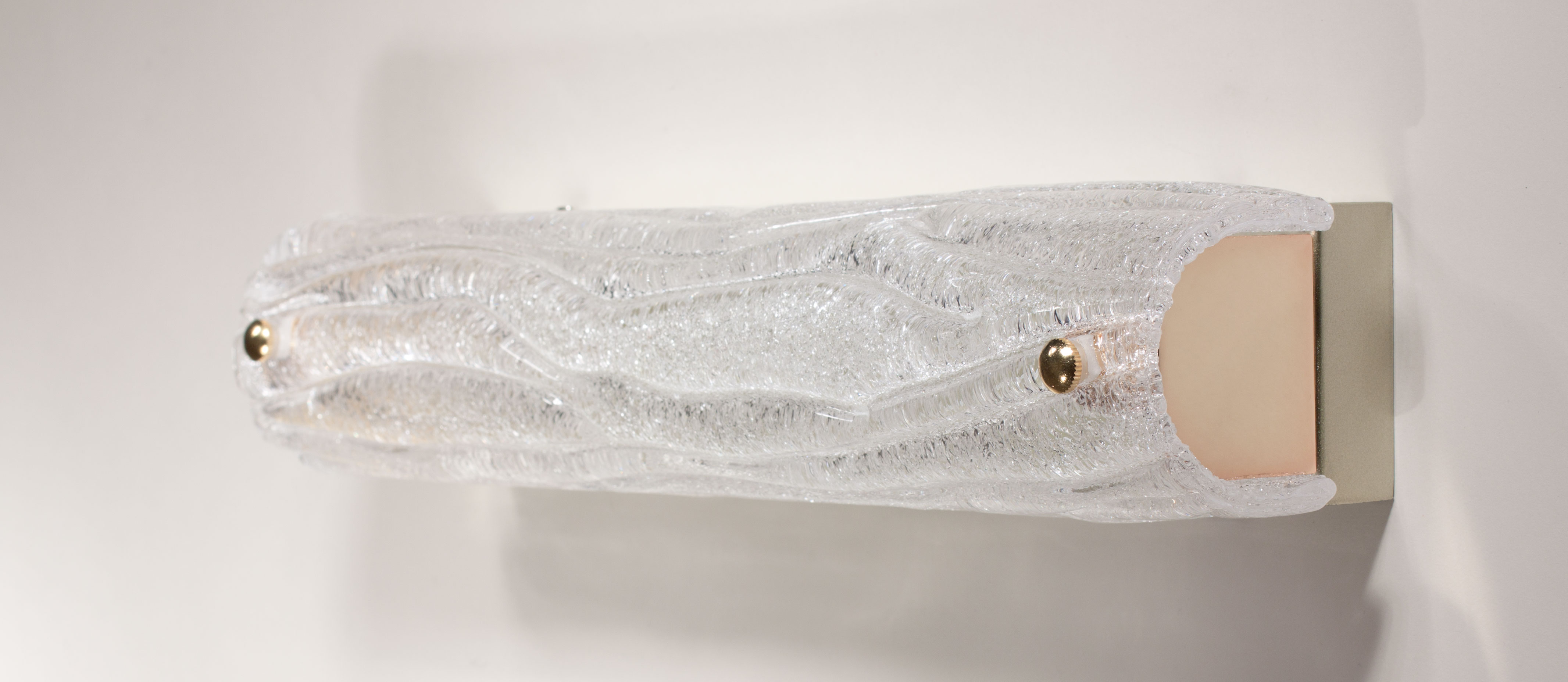 Один из светильников, полностью адаптированный на технологию LED (светодиодный источник света). Модуль LED, а так же драйвер могут быть быстро заменены.